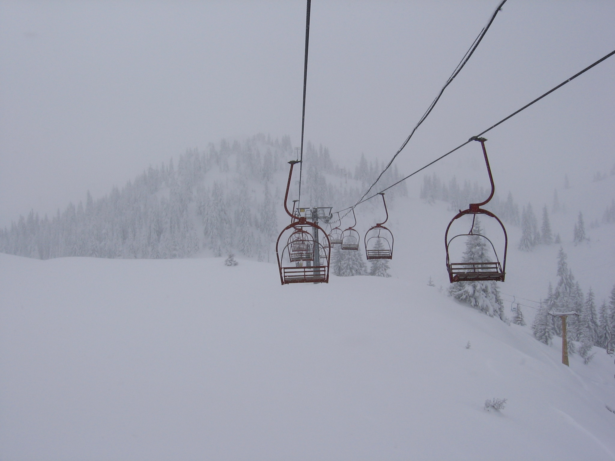 Жичара на Јахорини